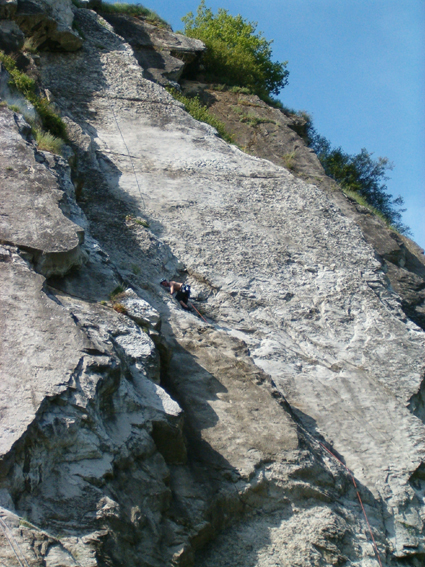 Kletterwand, Les Awirs (Maastal, Belgien), Routenerschliessung bis 7c in Kalk, CAB-BAC.